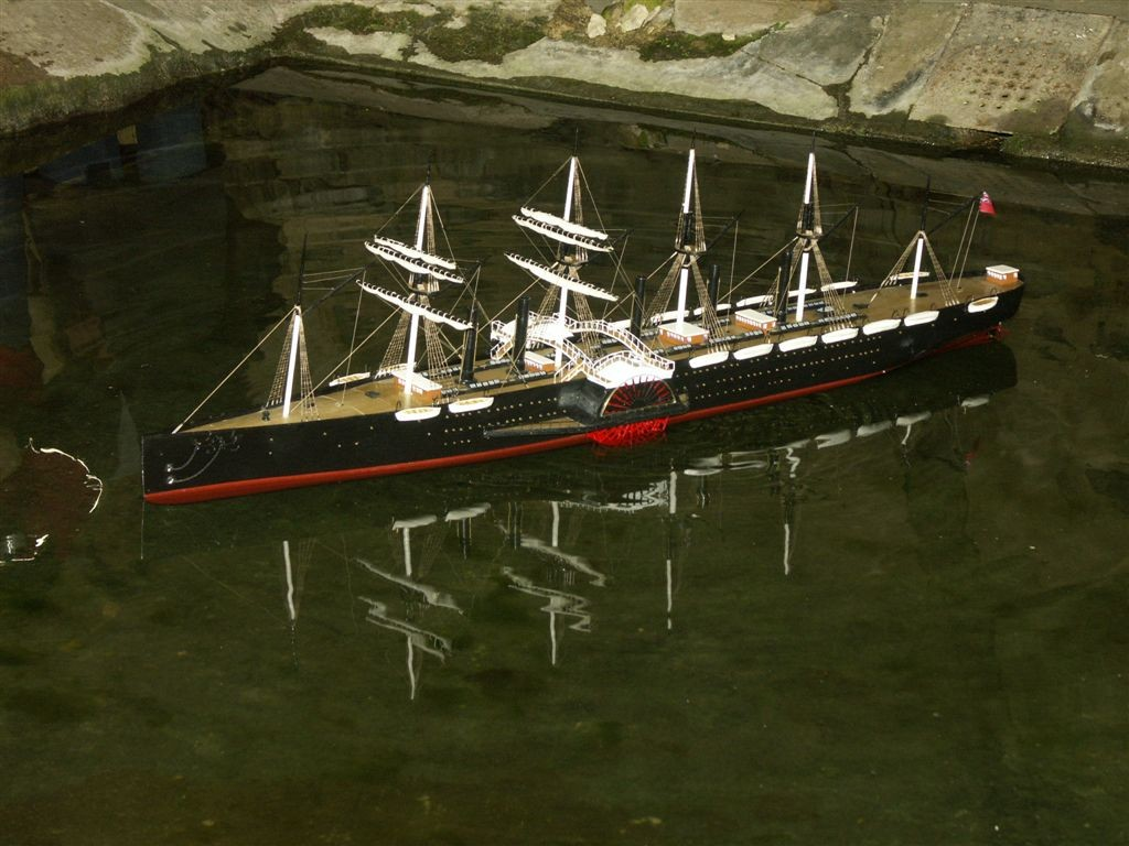 Maquette navigante au 1/150 eme du Great Eastern